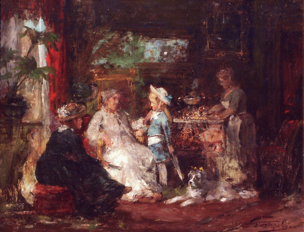 id. Vastagh György: Látogatóban c. festményének fotója